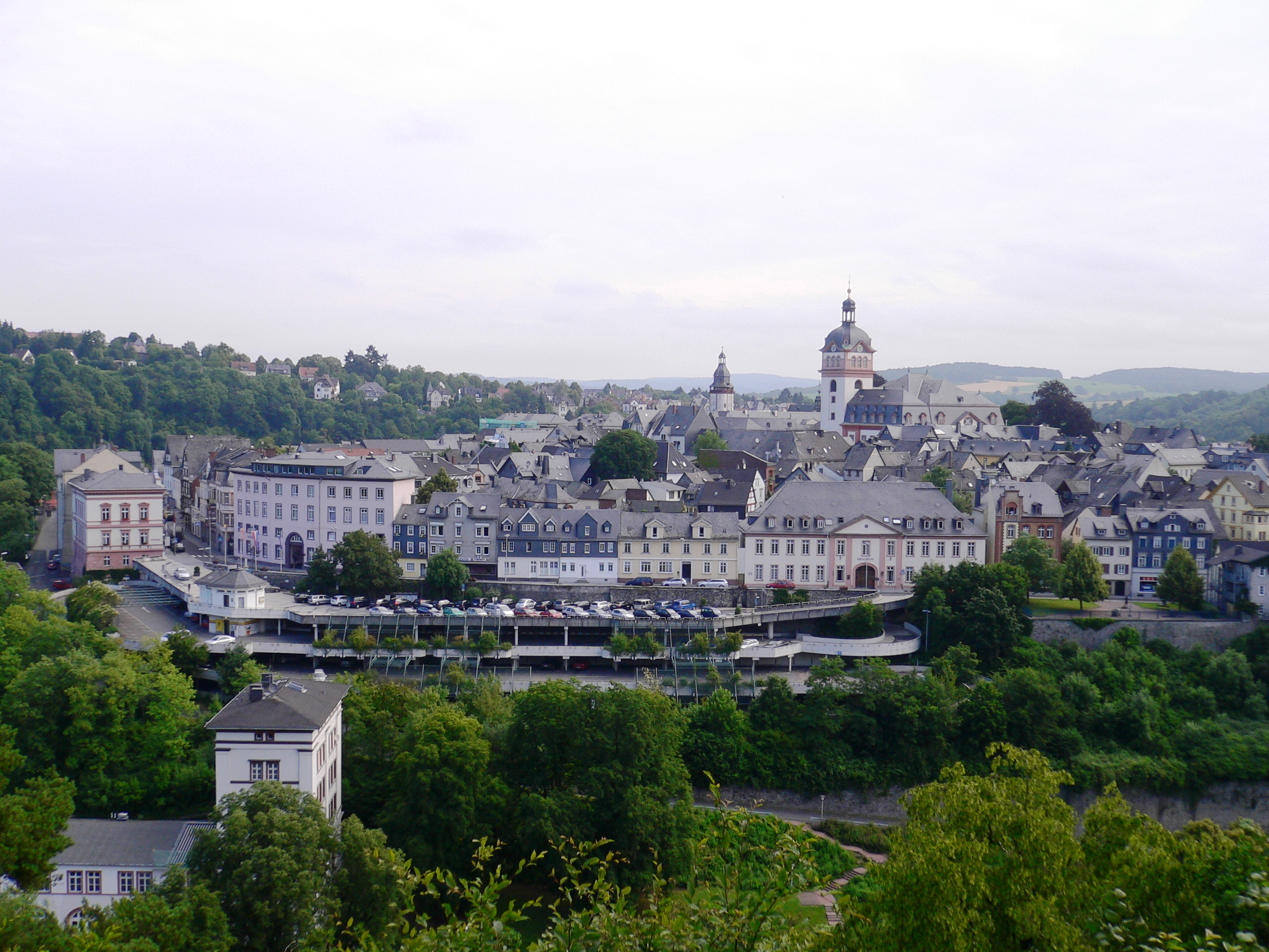 Die Weilburger Altstadt von Südwesten